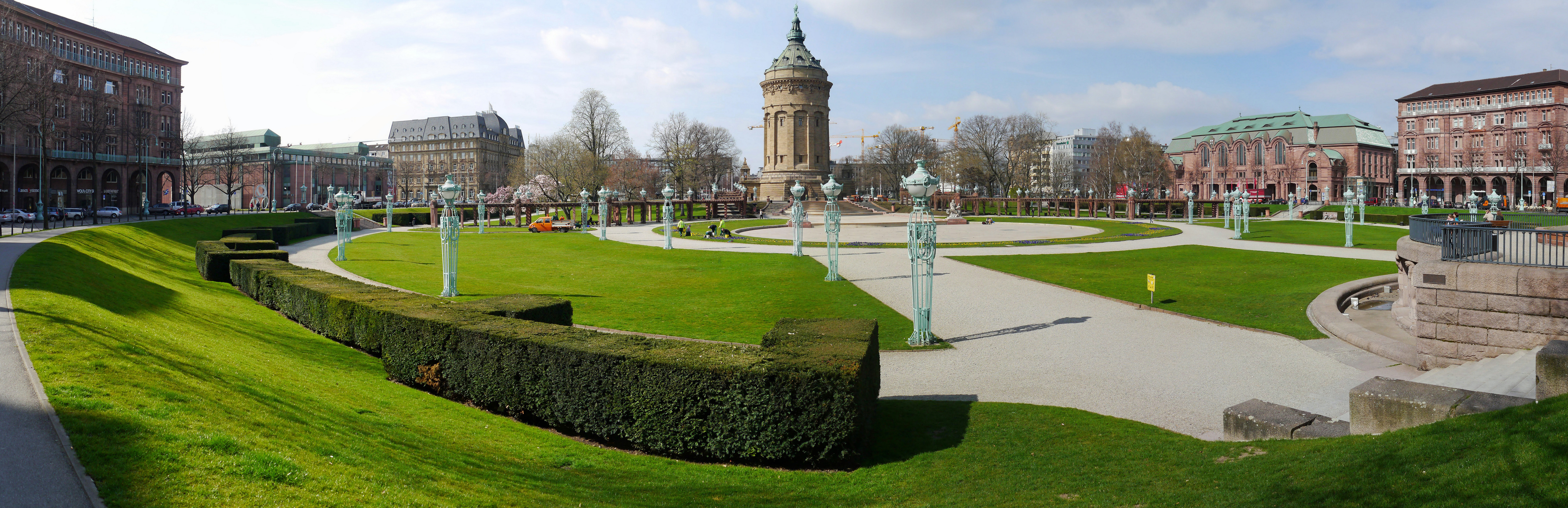 Der Friedrichsplatz in Mannheim. V.l.n.r.: Kunsthalle (Rückseite), Maritim Hotel, Wasserturm und Rosengarten.